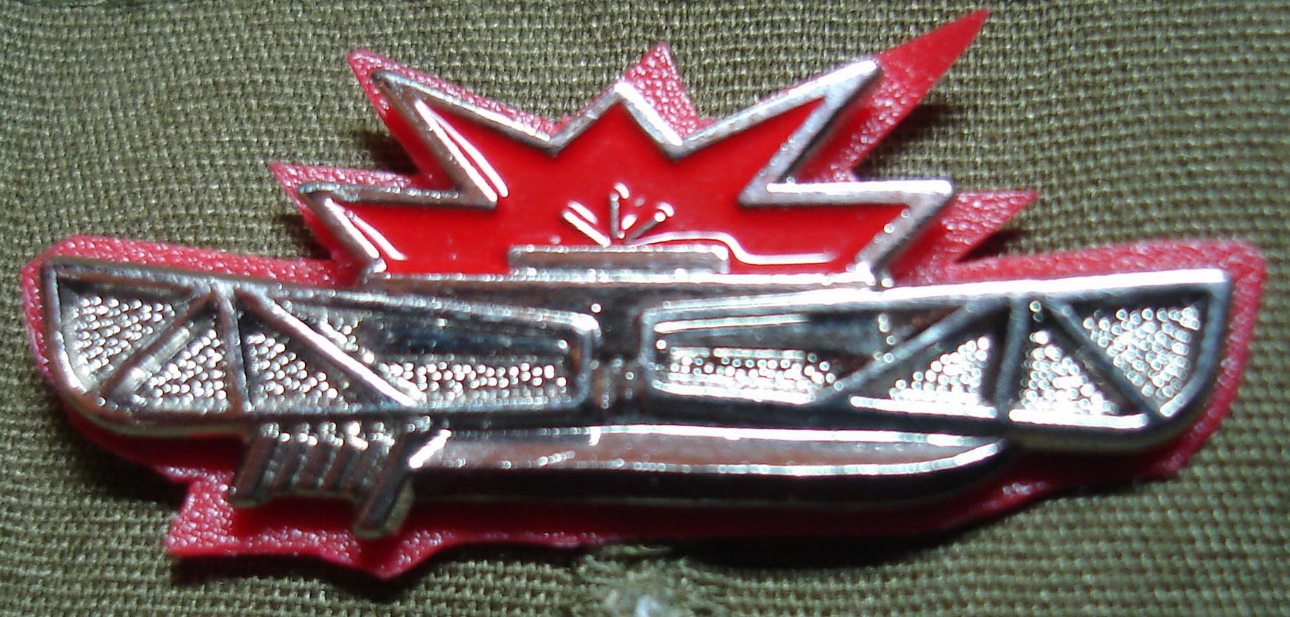 כומתה כסופה הנדסה קרבית